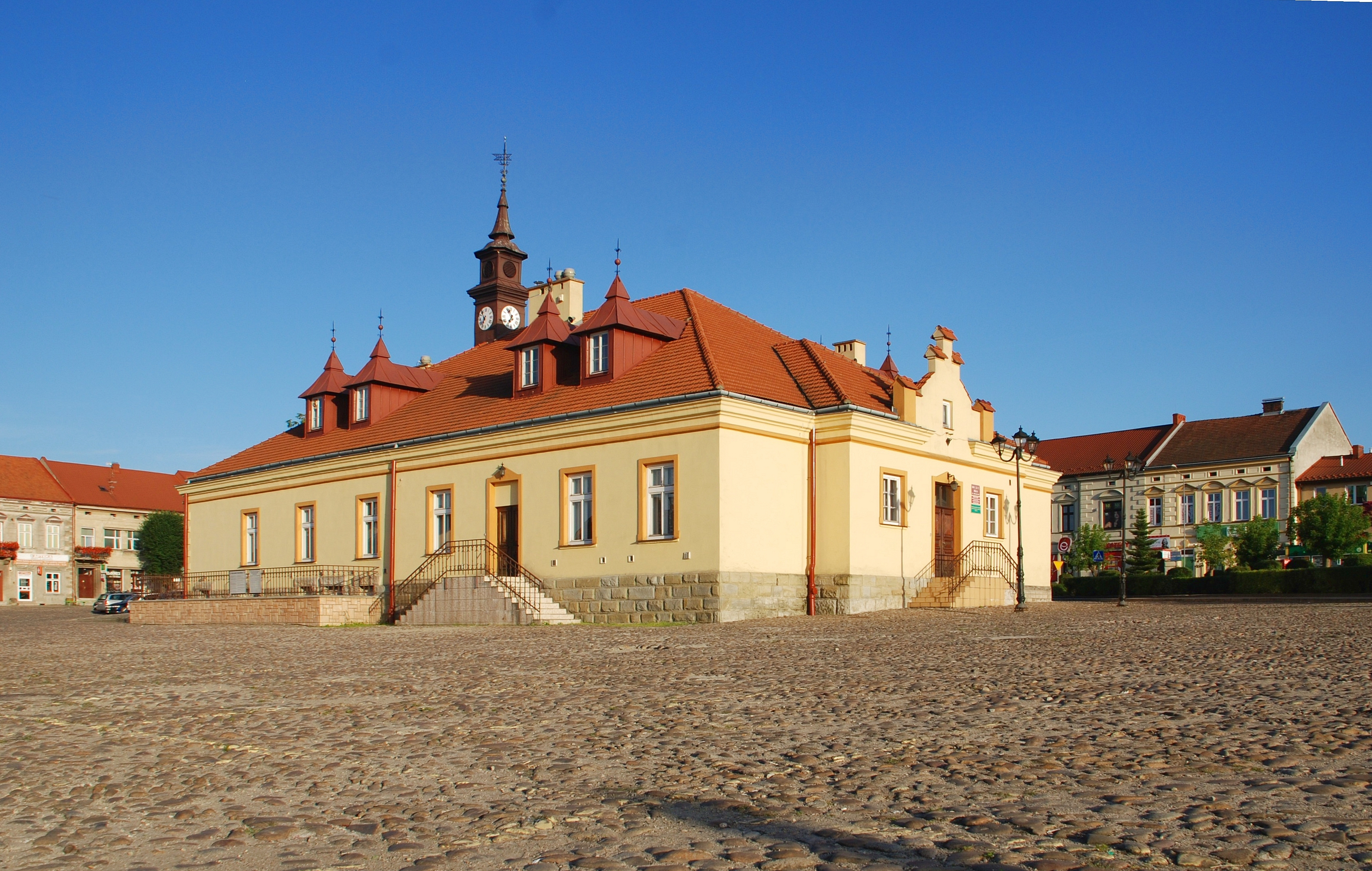 miasto Zakliczyn